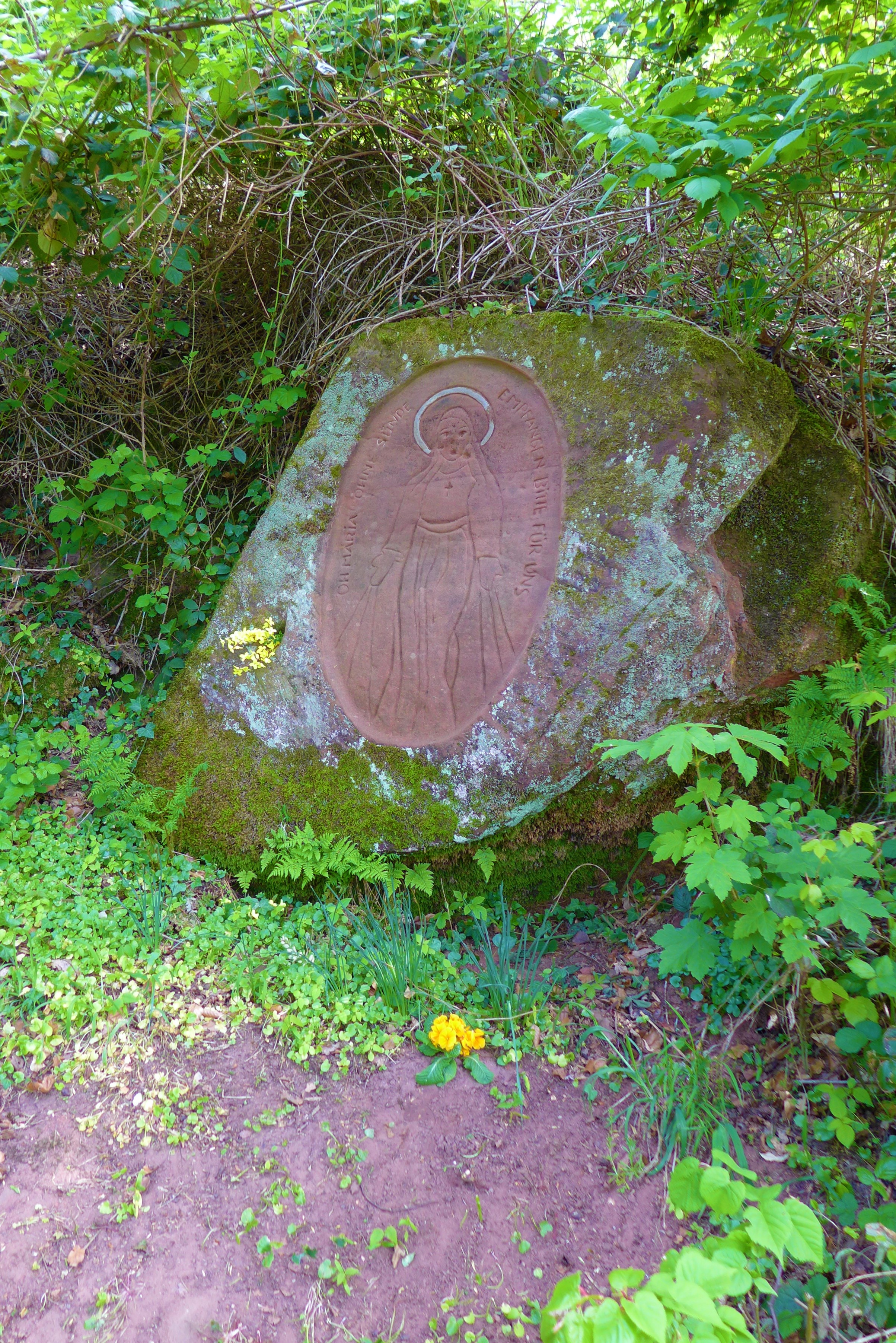 Wallerfangen, Kreuzweg am Limberg, Marianischer Gedenkstein mit der Darstellung der Muttergottes von der "Wundertätigen Medaille"